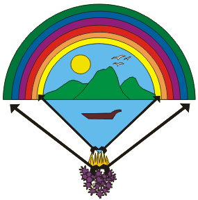 Escut de la província de Guainia, Colòmbia